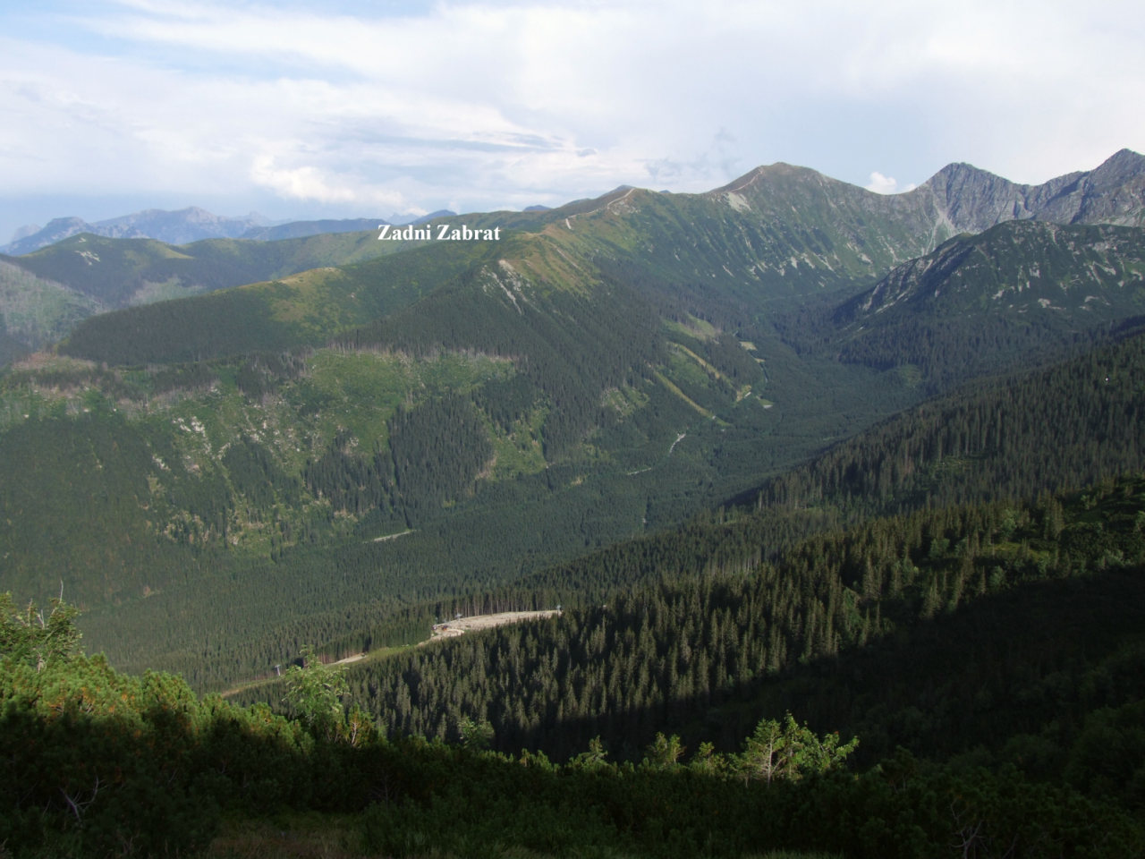 Zadni Zabrat (West Tatra Mountains)